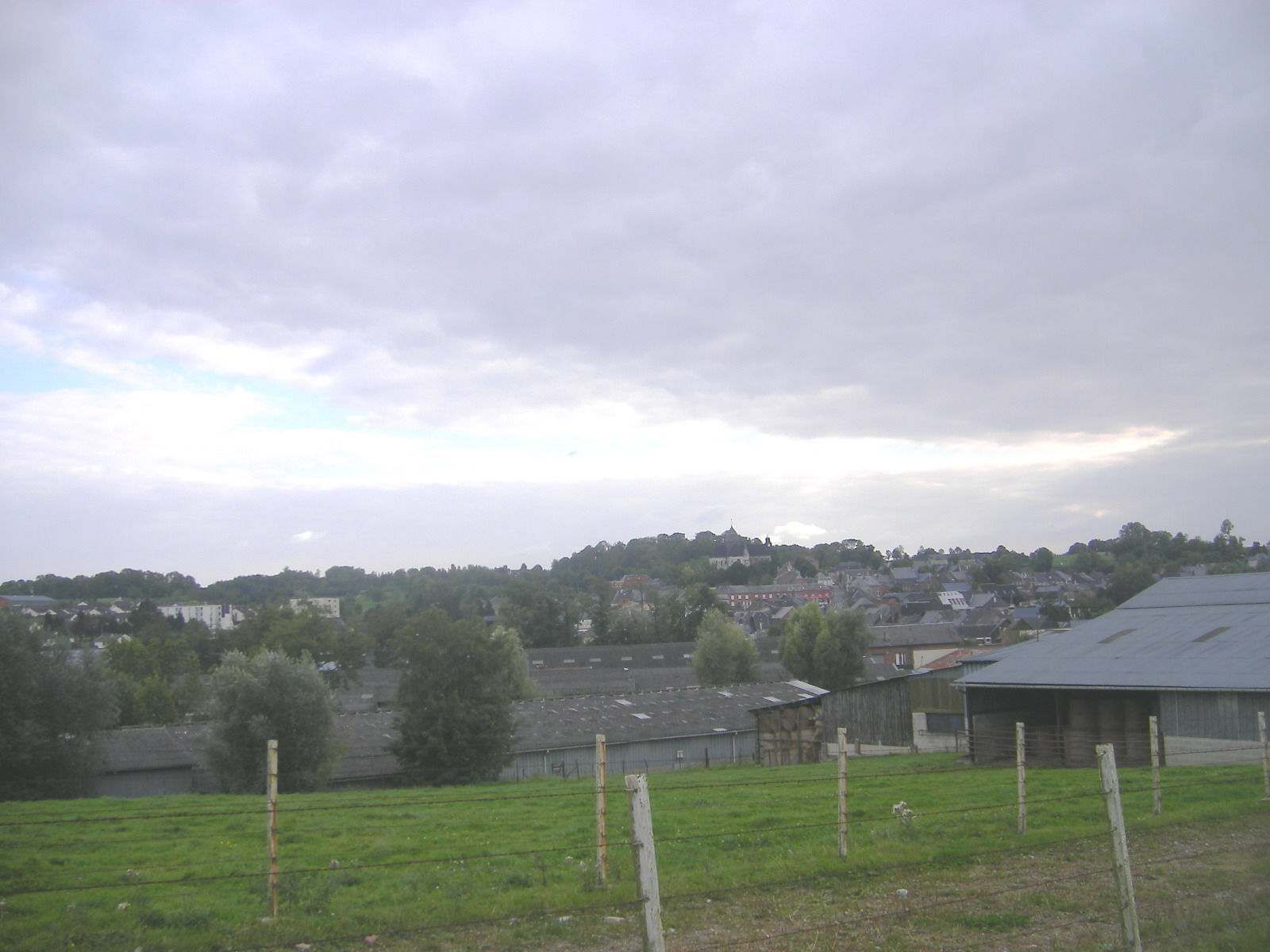 Rozoy-sur-Serre